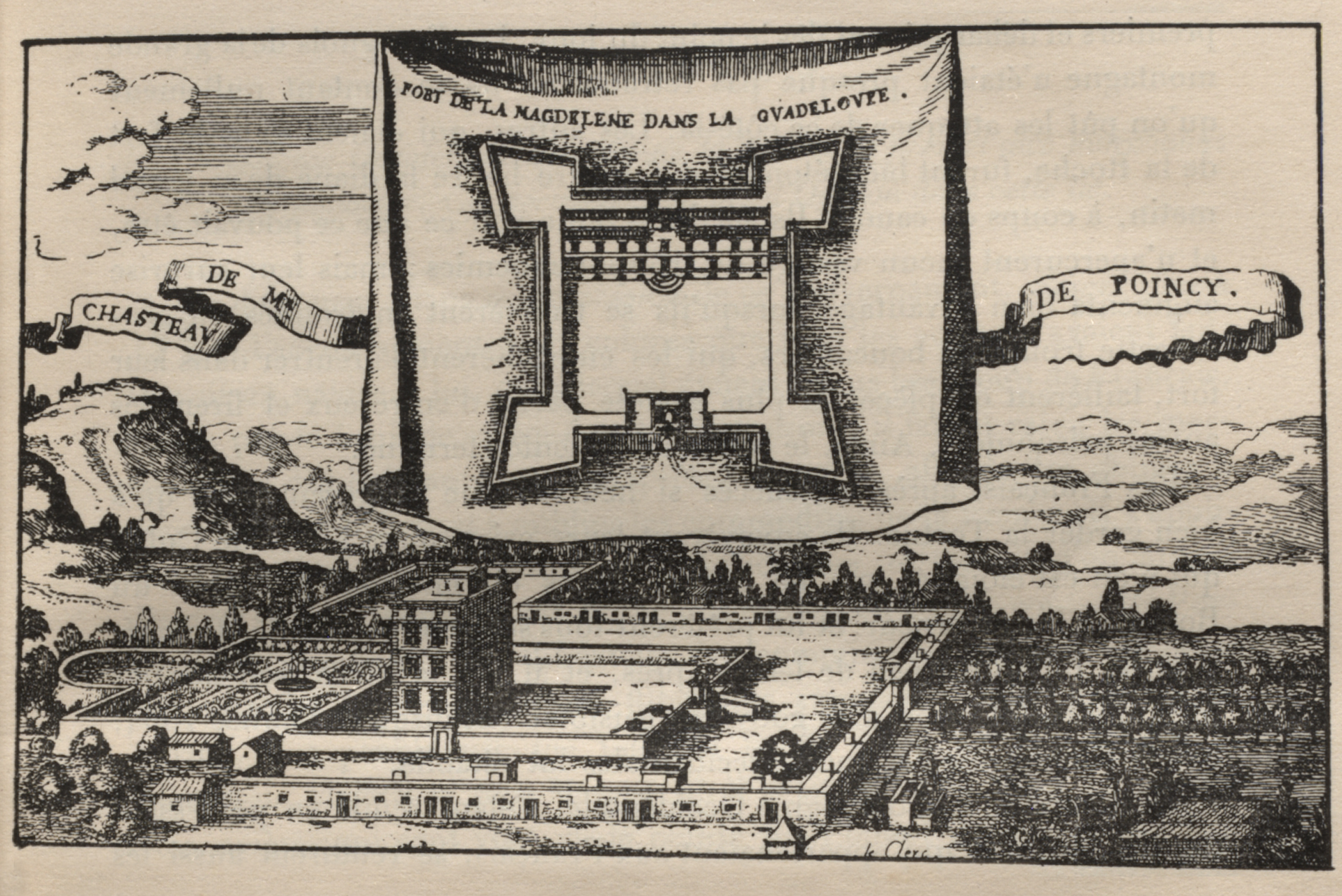 Château de la Montagne du gouverneur de Poincy dans la colonie française de Saint-Christophe et plan du fort de la Madeleine en Guadeloupe. Gravure de Du Clerc publiée dans l'Histoire Générale des Antilles du Père Jean-Baptiste du Tertre (XVIIème siècle).